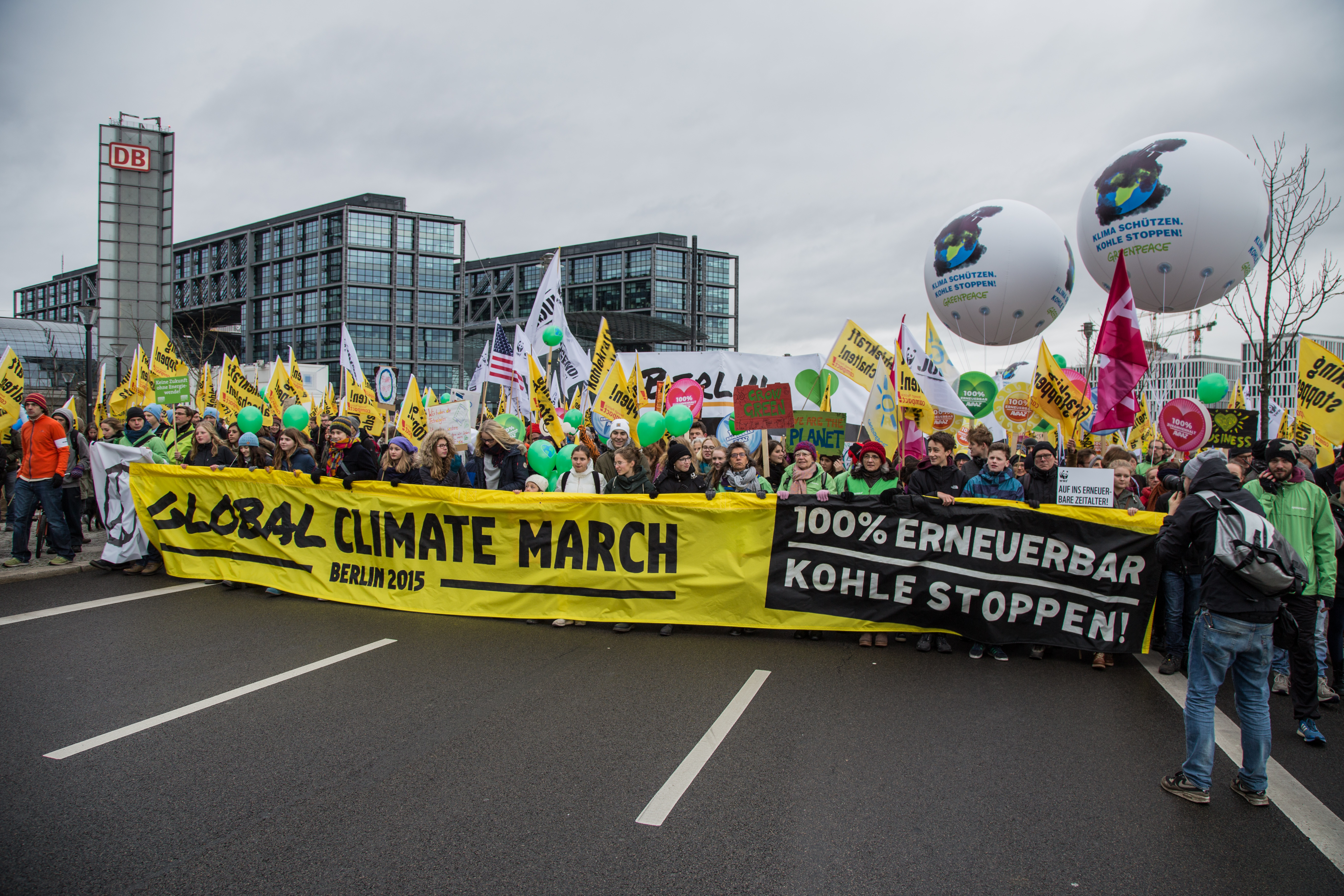 Am 29. November 2015 gingen, anlässlich der Weltklimakonferenz COP21 in Paris, ca. 17.000 Menschen in Berlin auf die Straße um auf dem weltweit stattfindenden Global Climate March für echten Klimaschutz zu demonstrieren. Trägerkreis des Protests in Deutschland waren Avaaz, Campact, Greenpeace, Klima-Allianz, NABU, Oxfam & WWF.